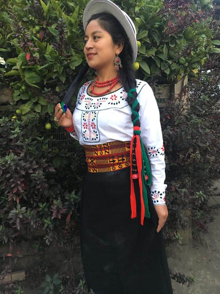 Vestimenta Pueblo Puruhá- Guamote